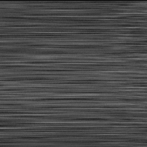 História Temporal do Padrão de Speckle THSP